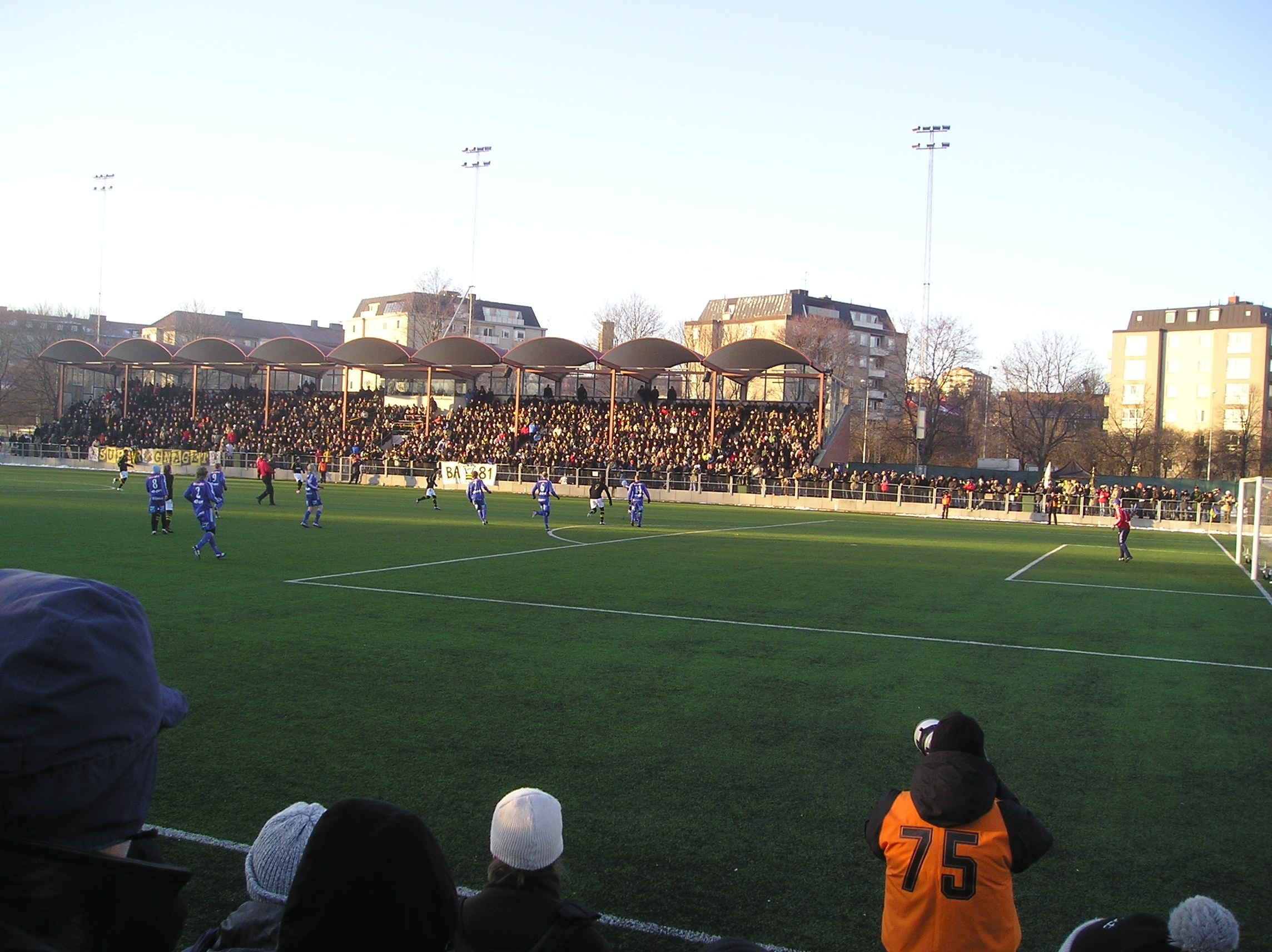 Skytteholms IP, GIF Sundsvall spelar träningsmatch mot AIK